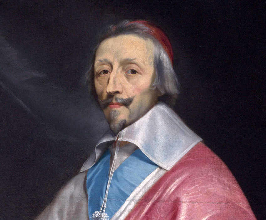 Ausschnitt eines ganzfigurigen Gemäldes